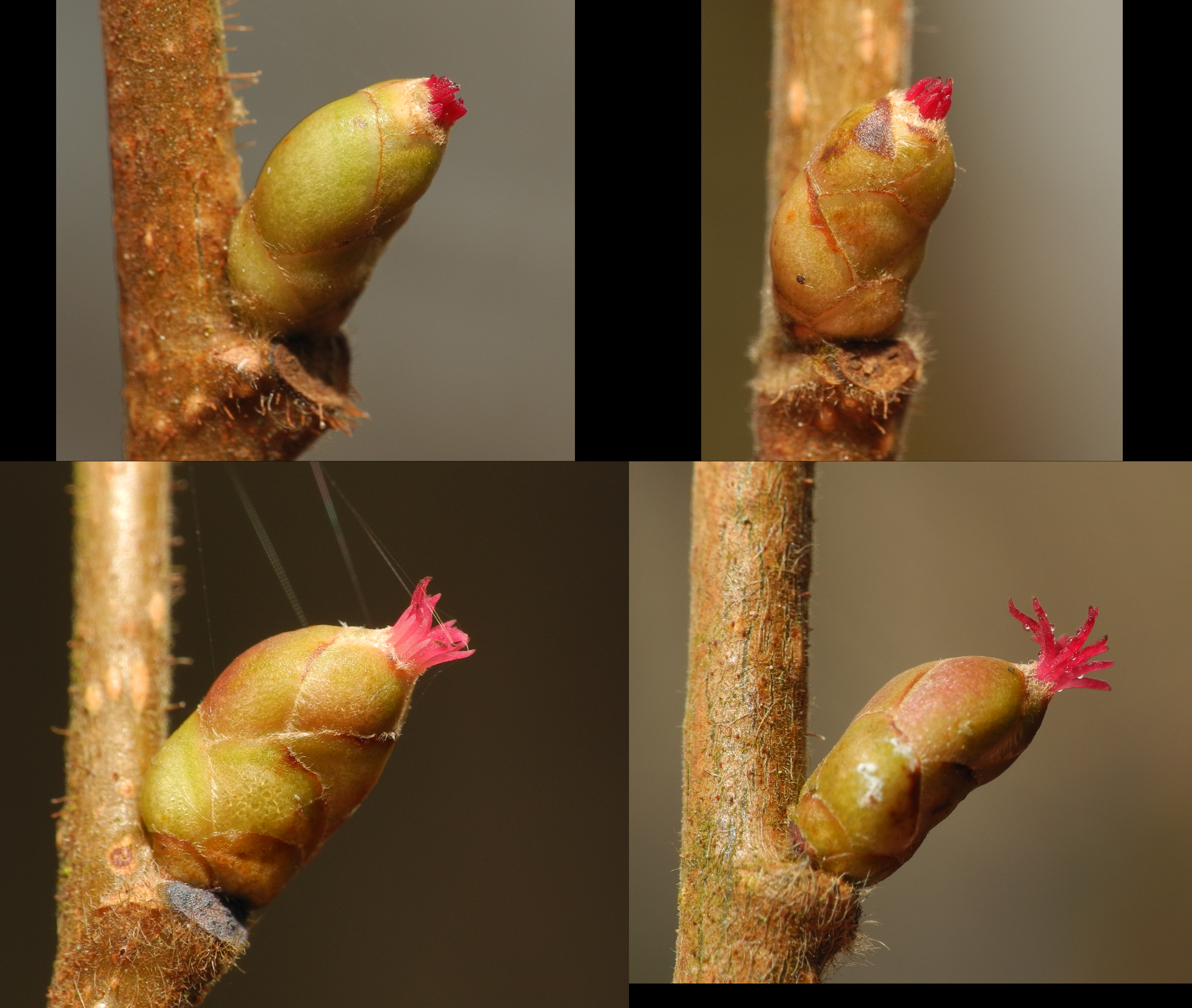 Fleurs femelle de noisetier. Image prise avec la bonnette Raynox DCR-250.